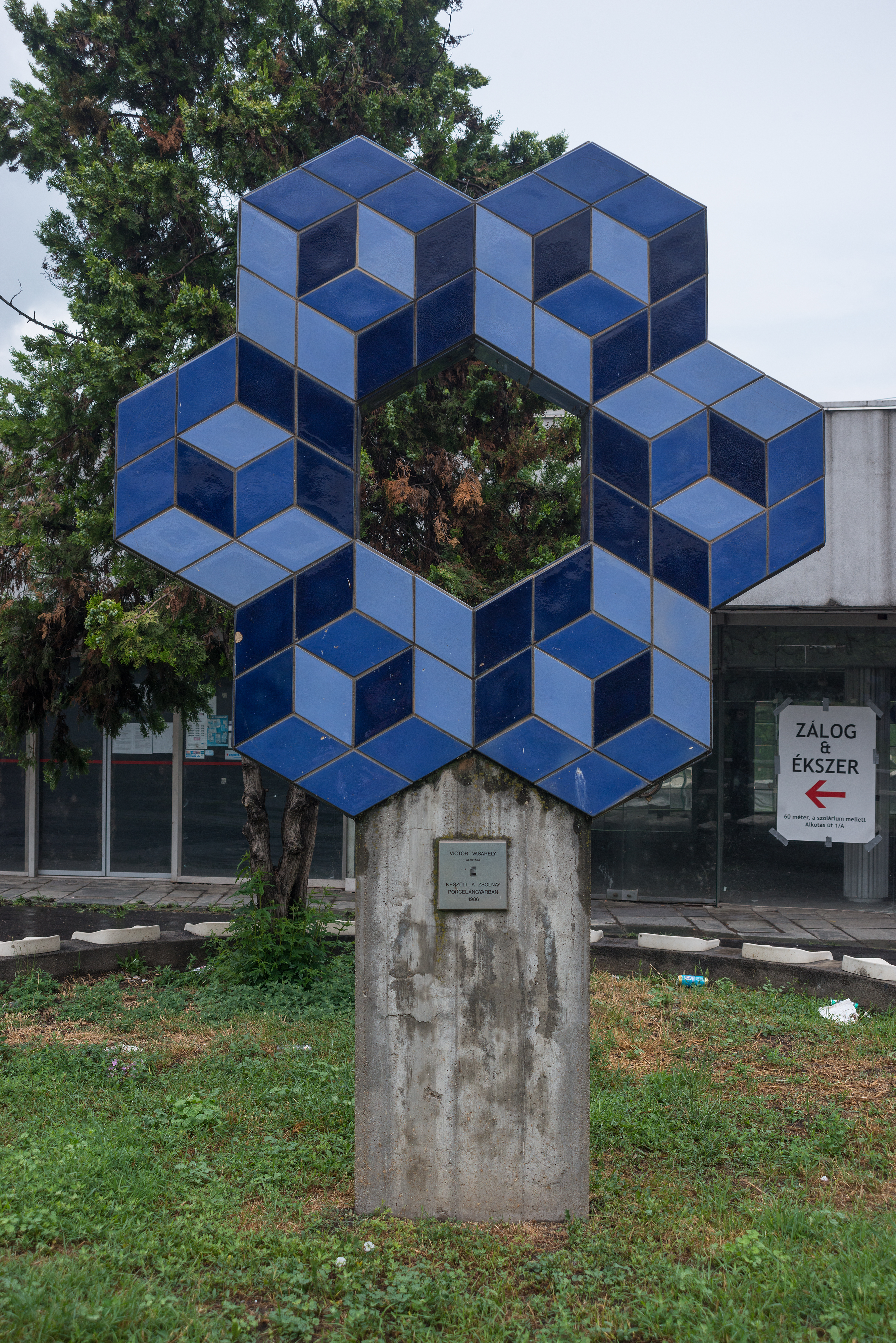 Auf dem Vorplatz des Budapester Südbahnhofs (Déli Pályaudvar) befindet sich vor einer leer stehenden Ladenzeile ein Kunstwerk von Victor Vasarely im öffentlichen Raum. Auf der darauf angebrachten Plakette befindet sich dieser Text: VICTOR VASARELY - ALKOTÁSA - KÉSZÜLT A ZSOLNAY - PORCELÁNGYÁRBAN - 1986